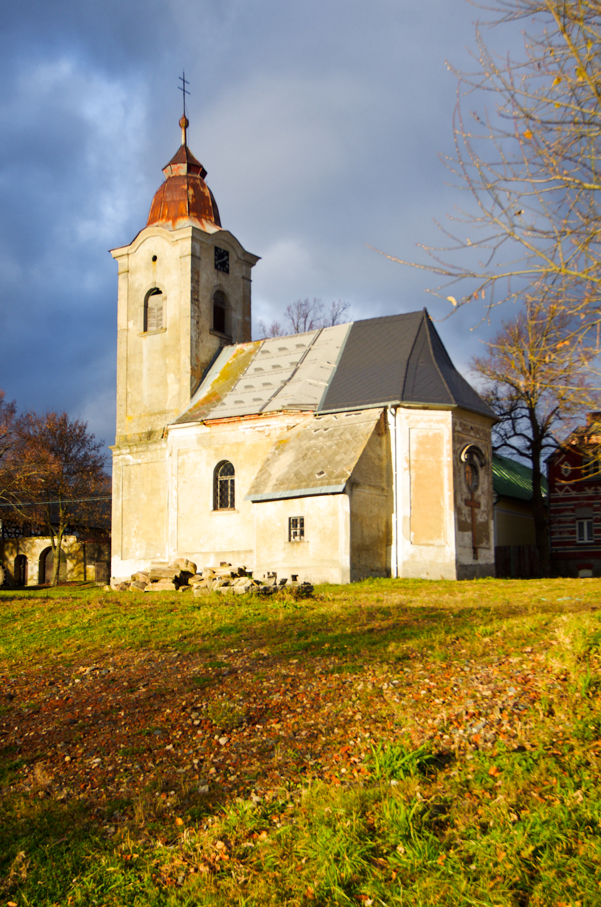 Kostel P. Marie Pomocné (Sítiny), na vršku při cestě k Pramenům, Sítiny